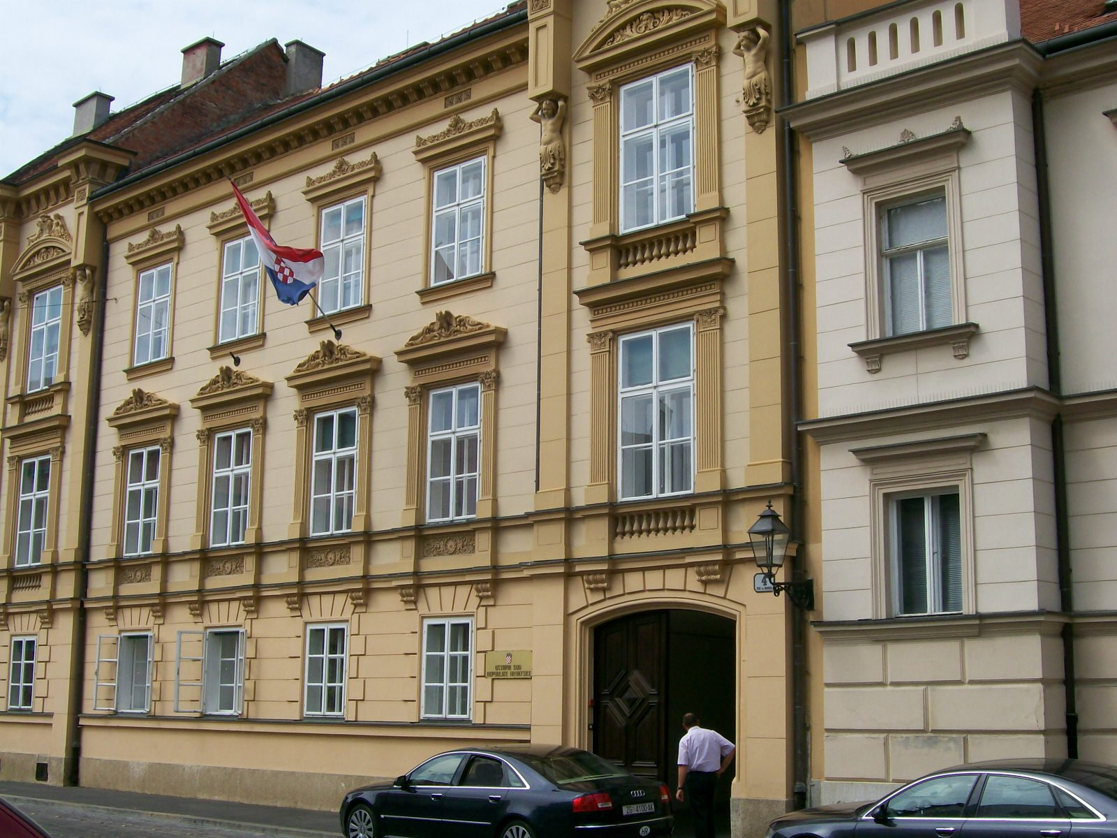 Zgrada Ustavnog suda RH u Zagrebu